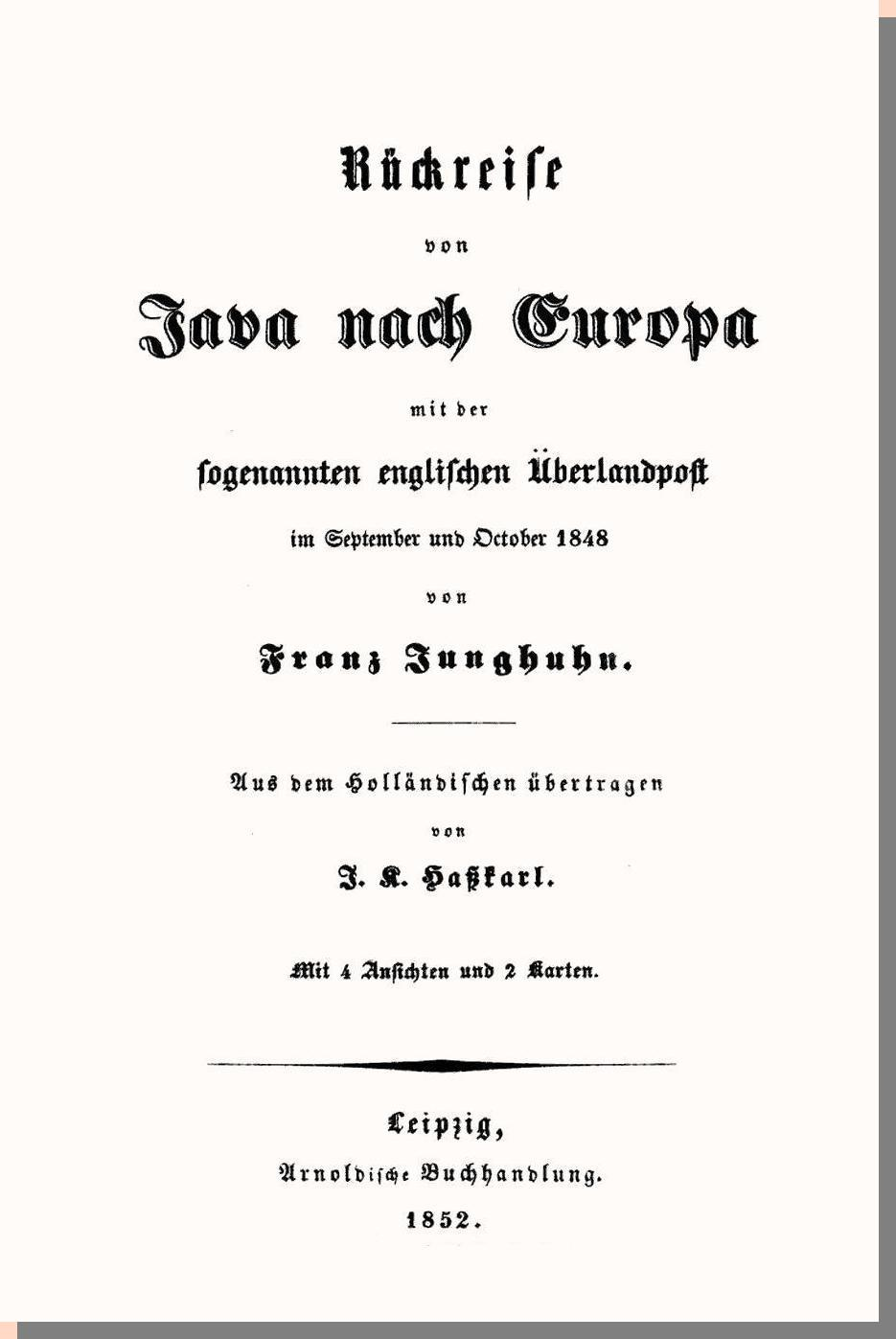 F. Junghuhn: Rückreise von Java nach Europa ... - Titelblatt.